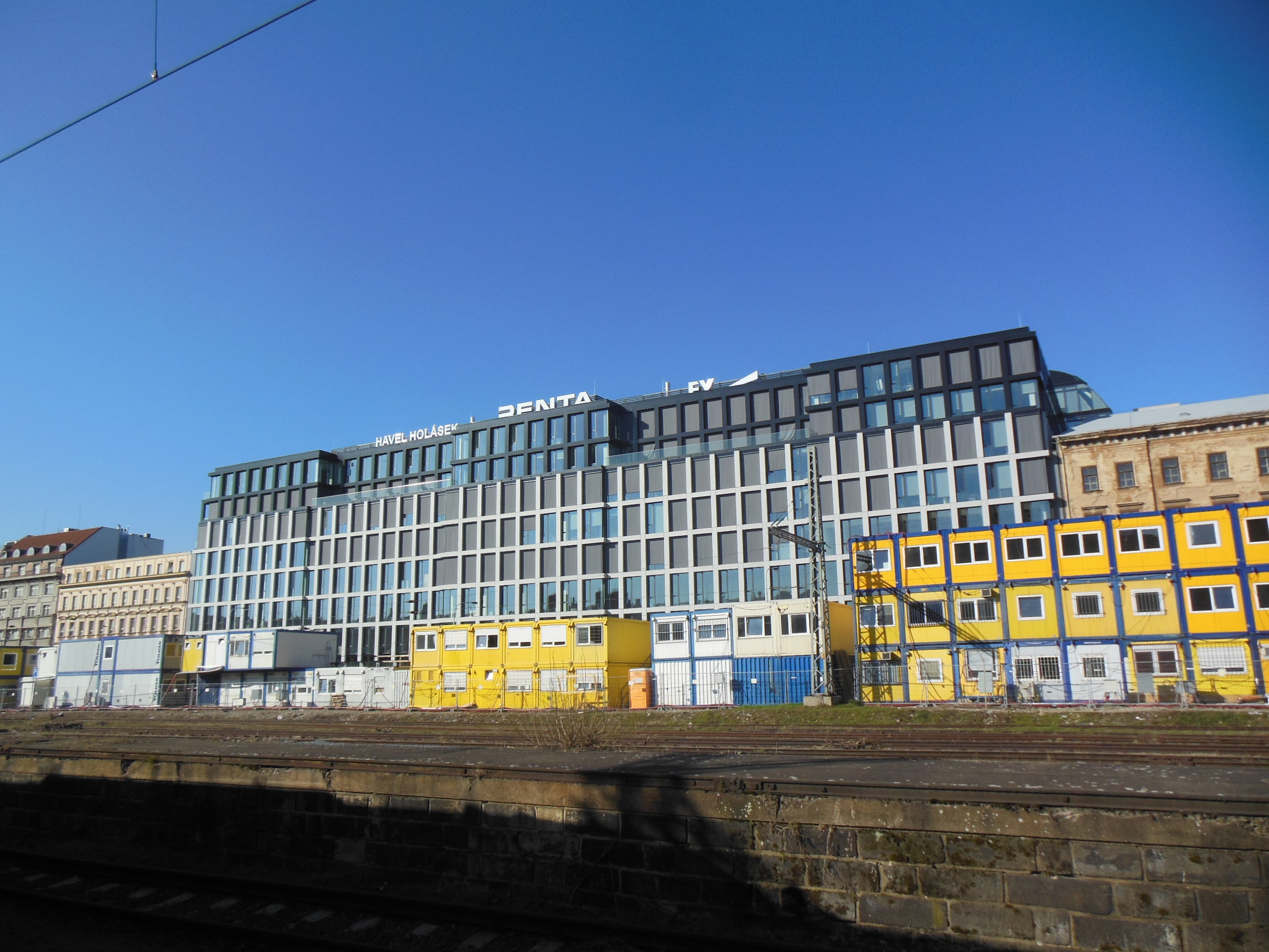 Praha-Nové Město. Florentinum v ulici Na Florenci, pohled z Masarykova nádraží.